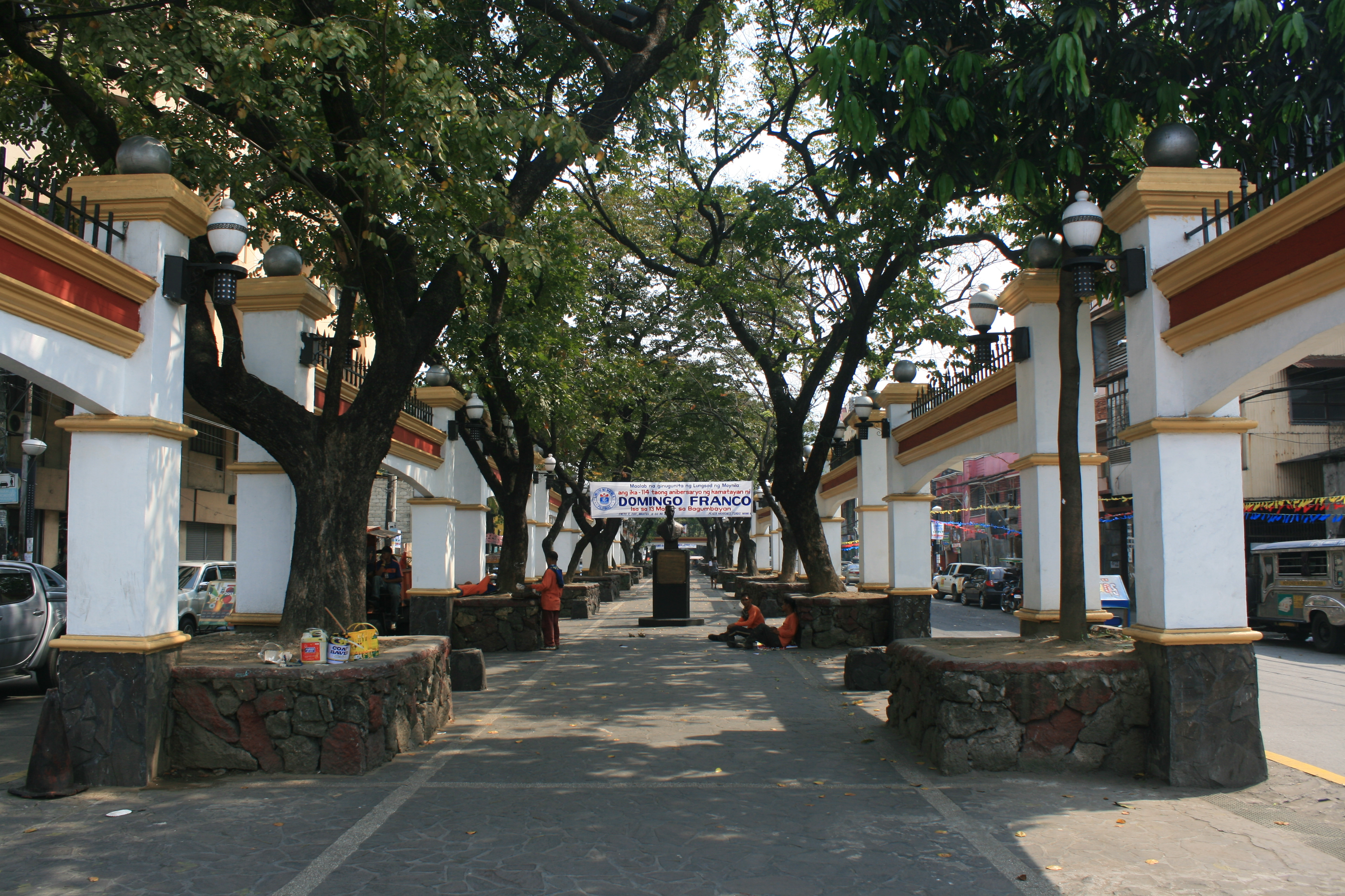 Plaza Moriones in Manila, Philippines